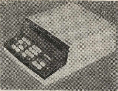 Elka-22 bułgarski kalkulator